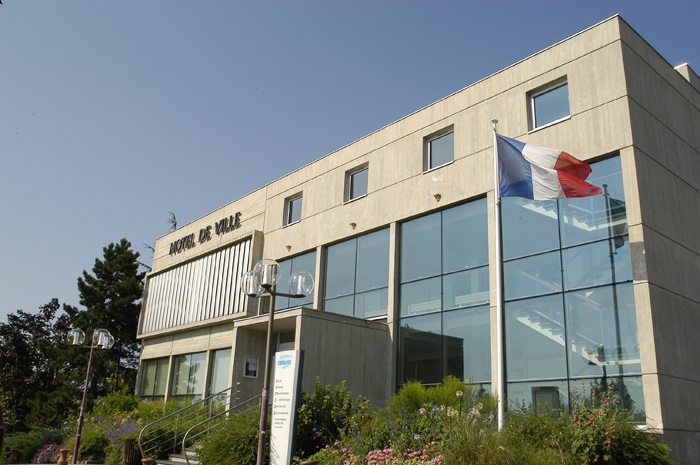 Hôtel de Ville de Fontaine-lès-Dijon, Place de l'Hôtel de Ville, 21121 Fontaine-lès-Dijon